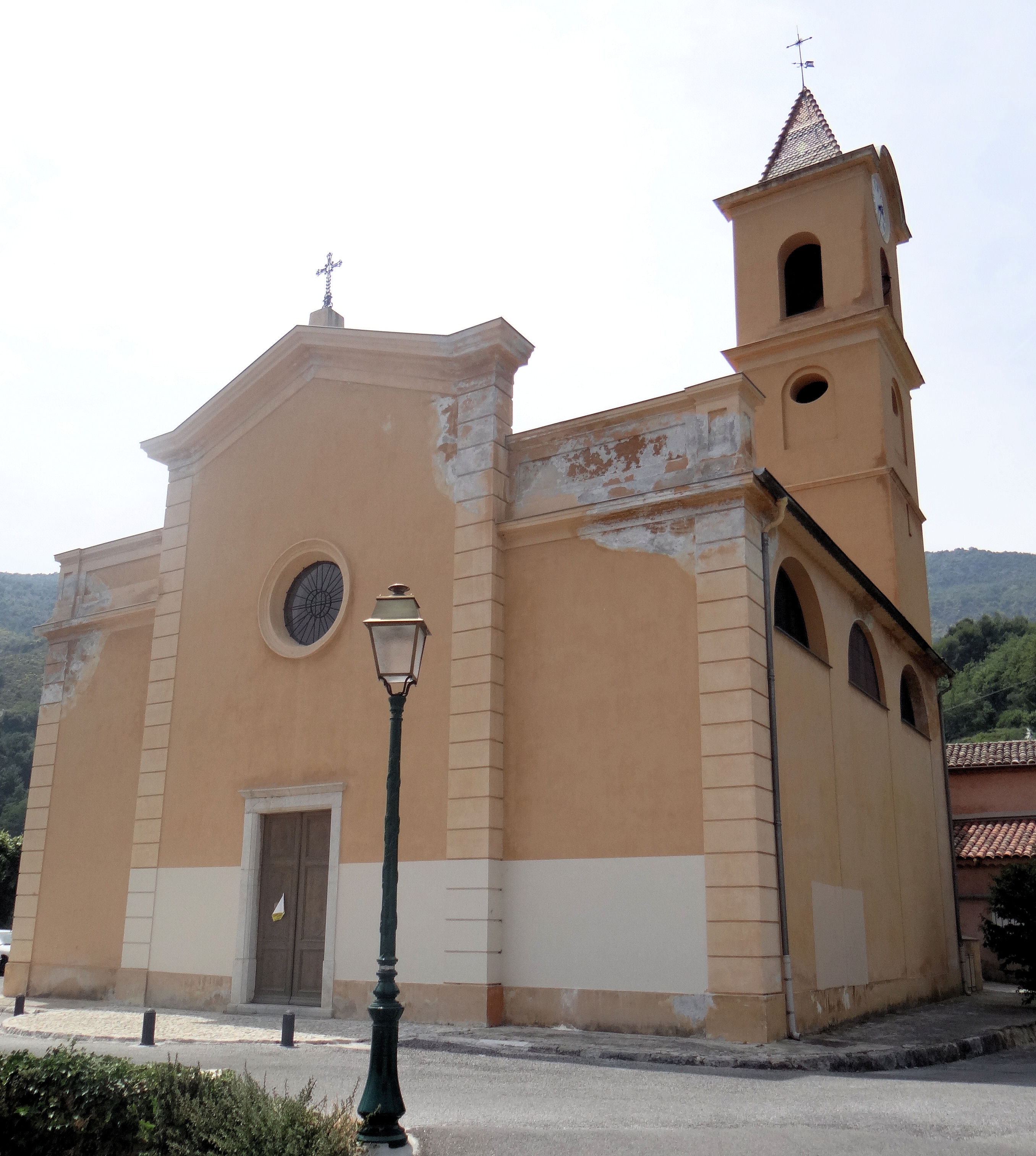 Bendejun - Eglise Notre-Dame-du-Rosaire - Façade